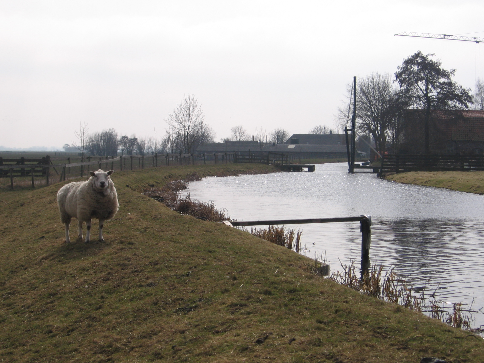 Zoeterwoude and surroundings